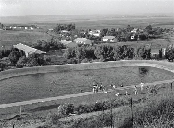 הזורע (יקנעם) - מאגר מים